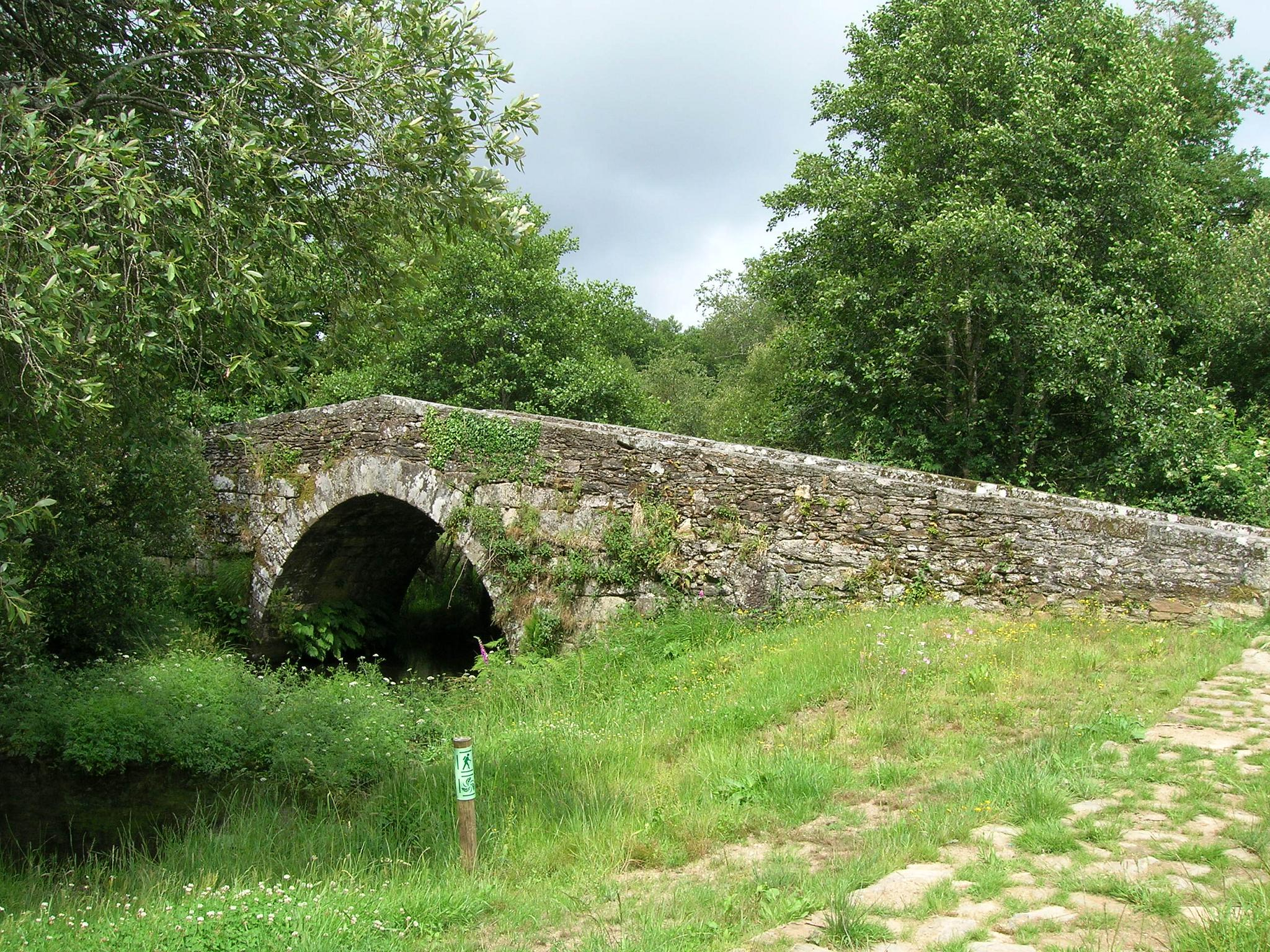 Ponte Vella de Andón, Forcarei, Río Lérez. Ponte sobre o río Lerez, construído no século XV. Ten un sí arco lixeiramente apuntado, duns 8 metros de luz, e a súa calzada conserva parte do enlosado que formaba o firme. A obra é atribuída a San Gonzalo das Penas, cando era abade do mosteiro de Santa María de Aciveiro.